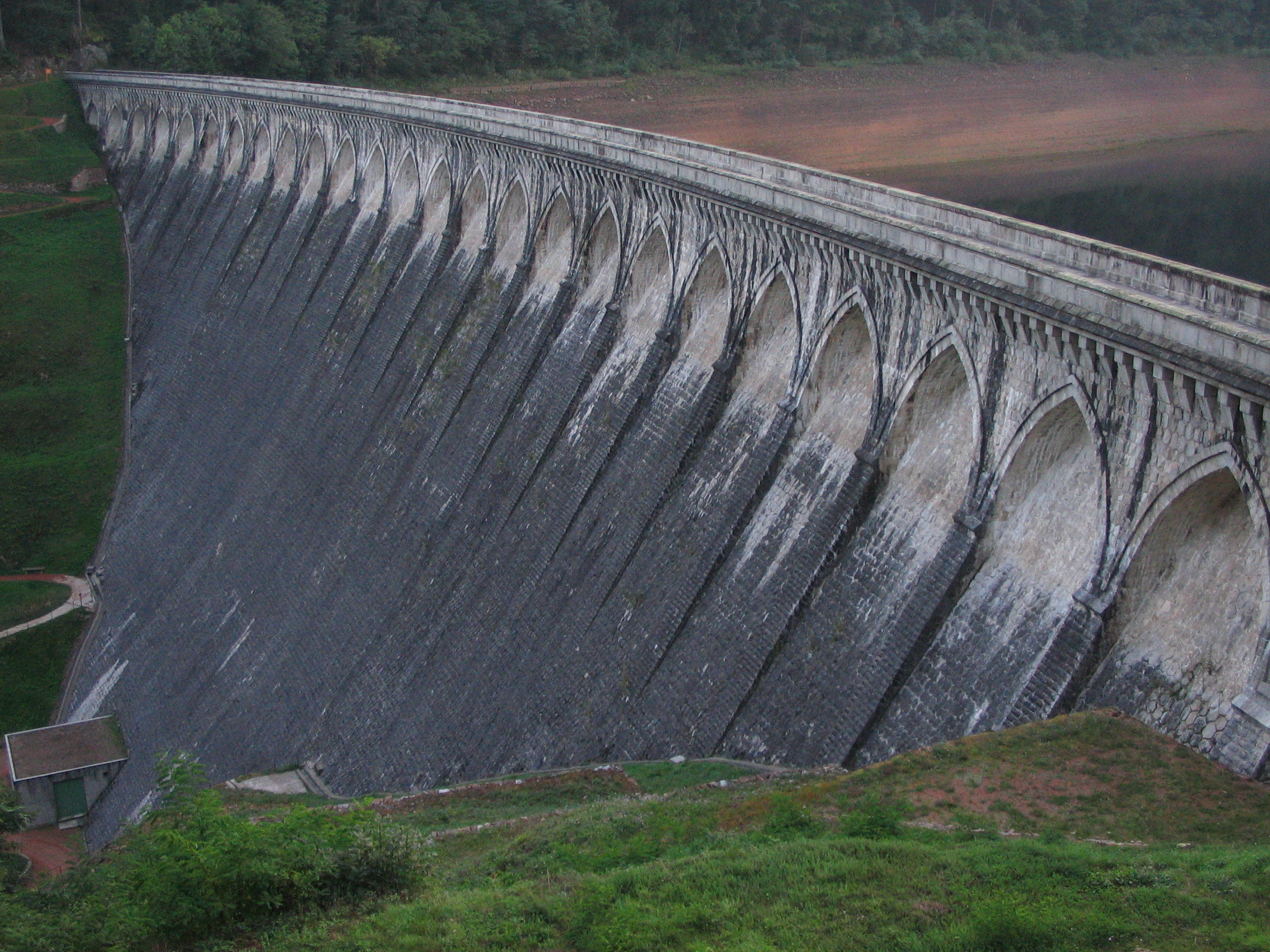 Barrage de la Tache à Renaison (Loire, France).